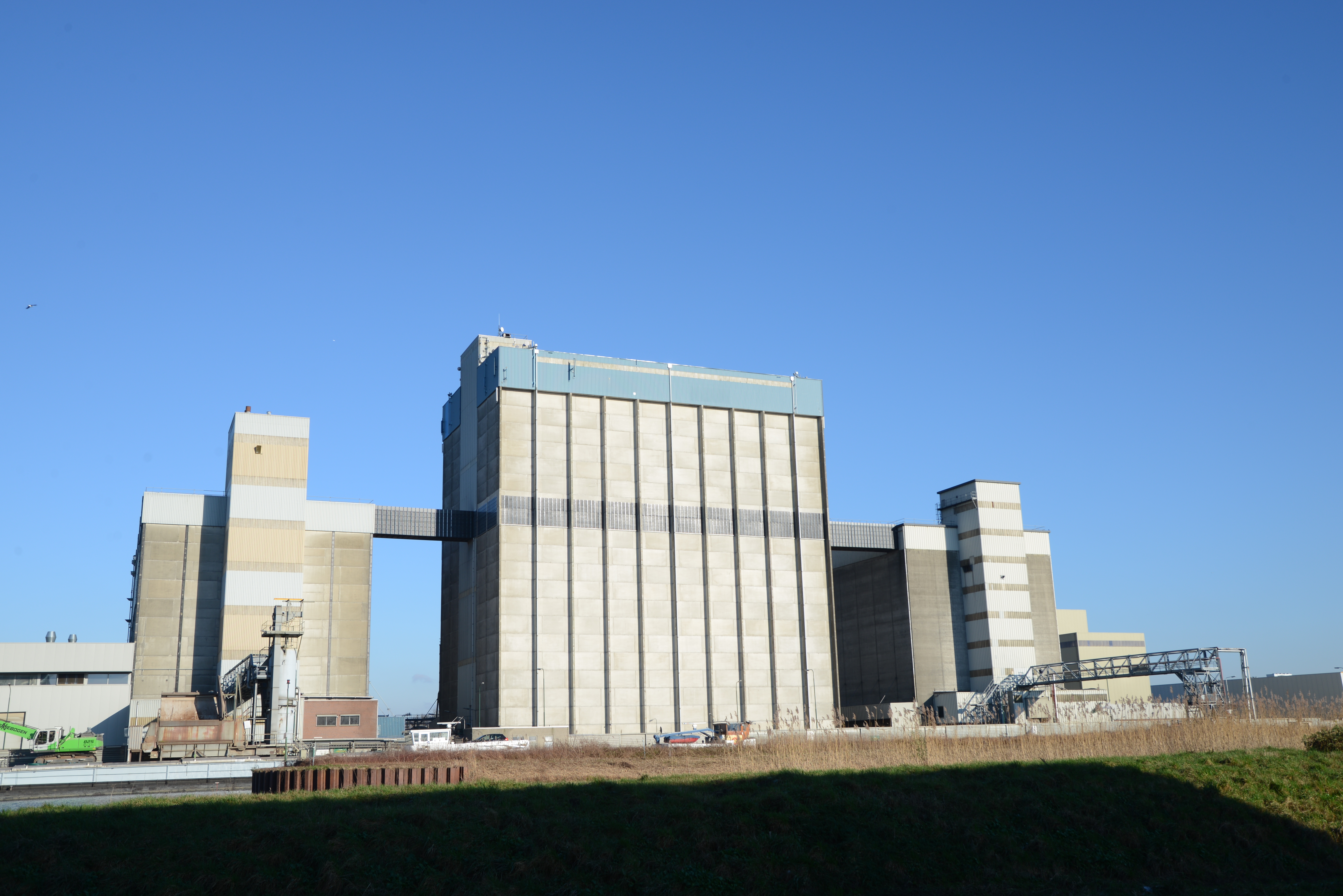 Agrifirm-fabriek in Veghel, Noord-Brabant, voorheen Cehave Landbouwbelang